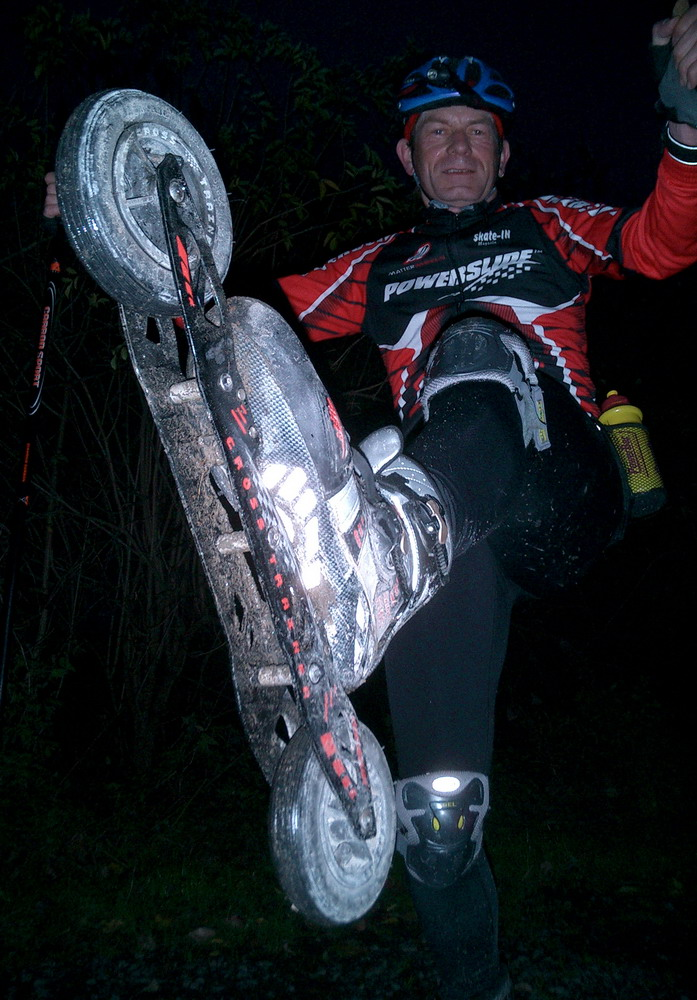 Geländegängige Skates für Nordic Skating